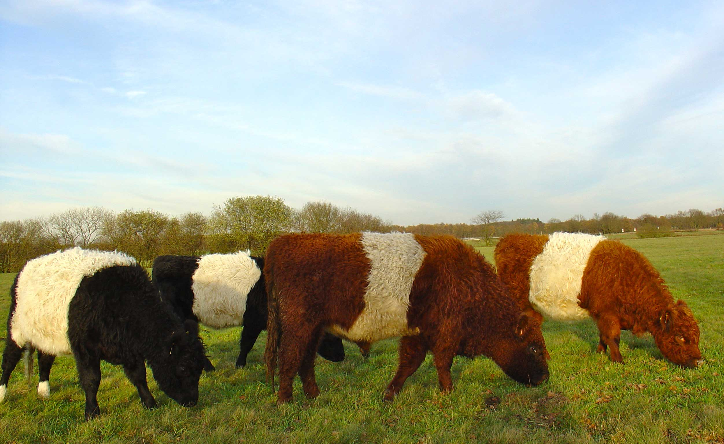 Belted Gallowaystiertjes Oude Beilerweg tegenover het Scharreveld